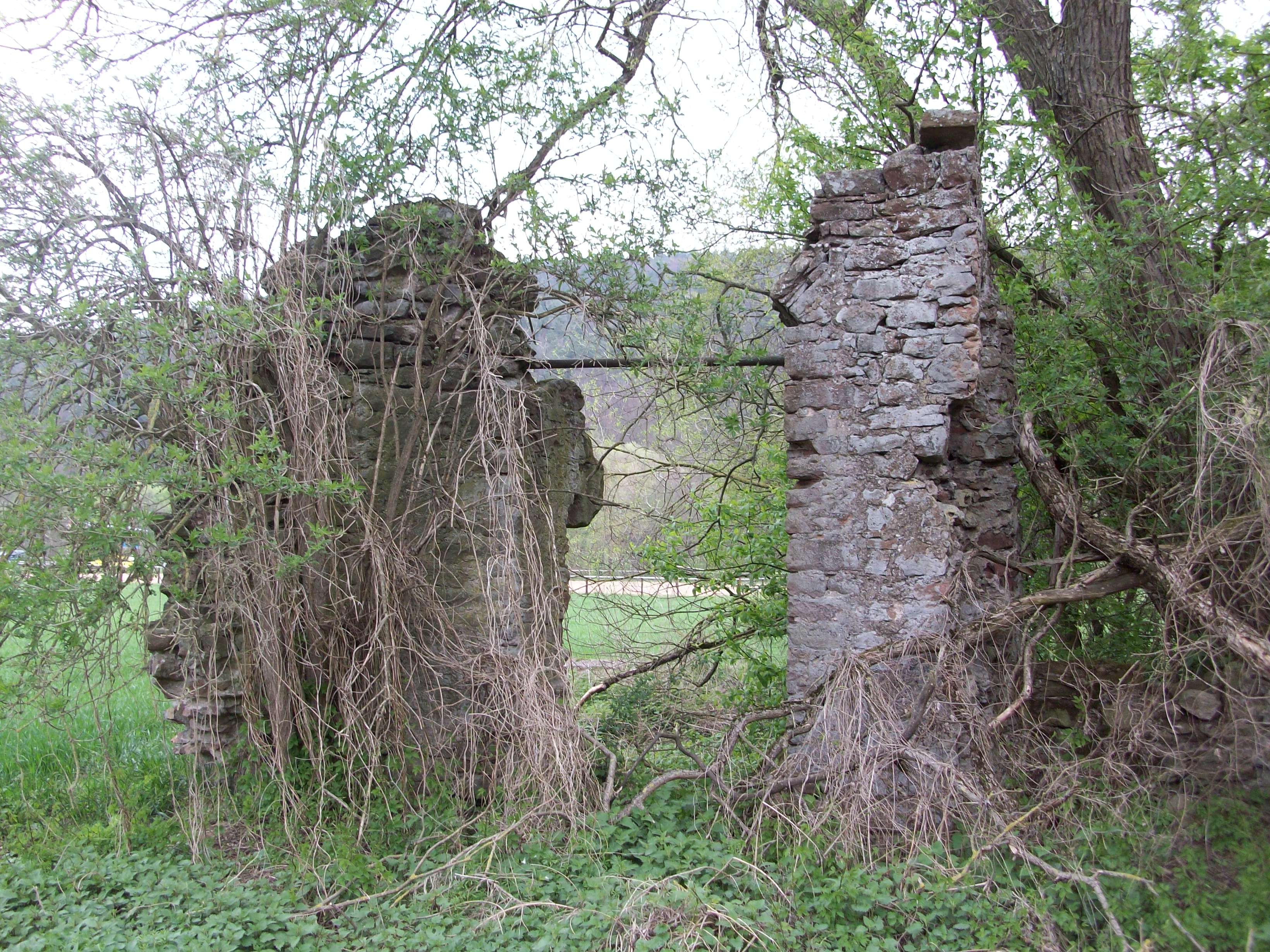 Der Eingang der Bacheburg von der Burgseite Richtung Mümling und Bundesstraße gesehen